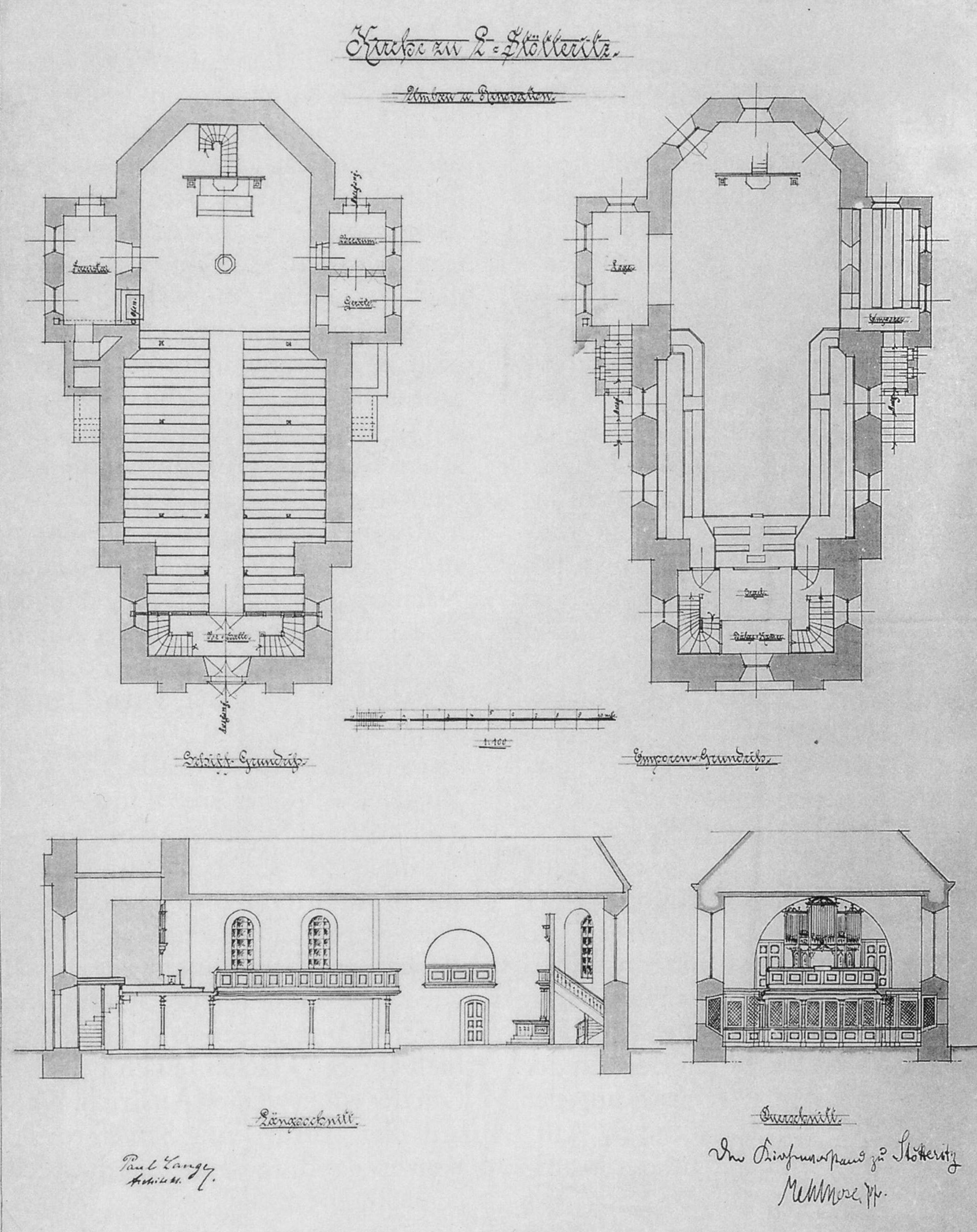 Grundriss des Erd- und Emporengeschosses sowie ein Längs- und ein Querschnitt der Marienkirche in Leipzig-Stötteritz. Zustand ab 1899.